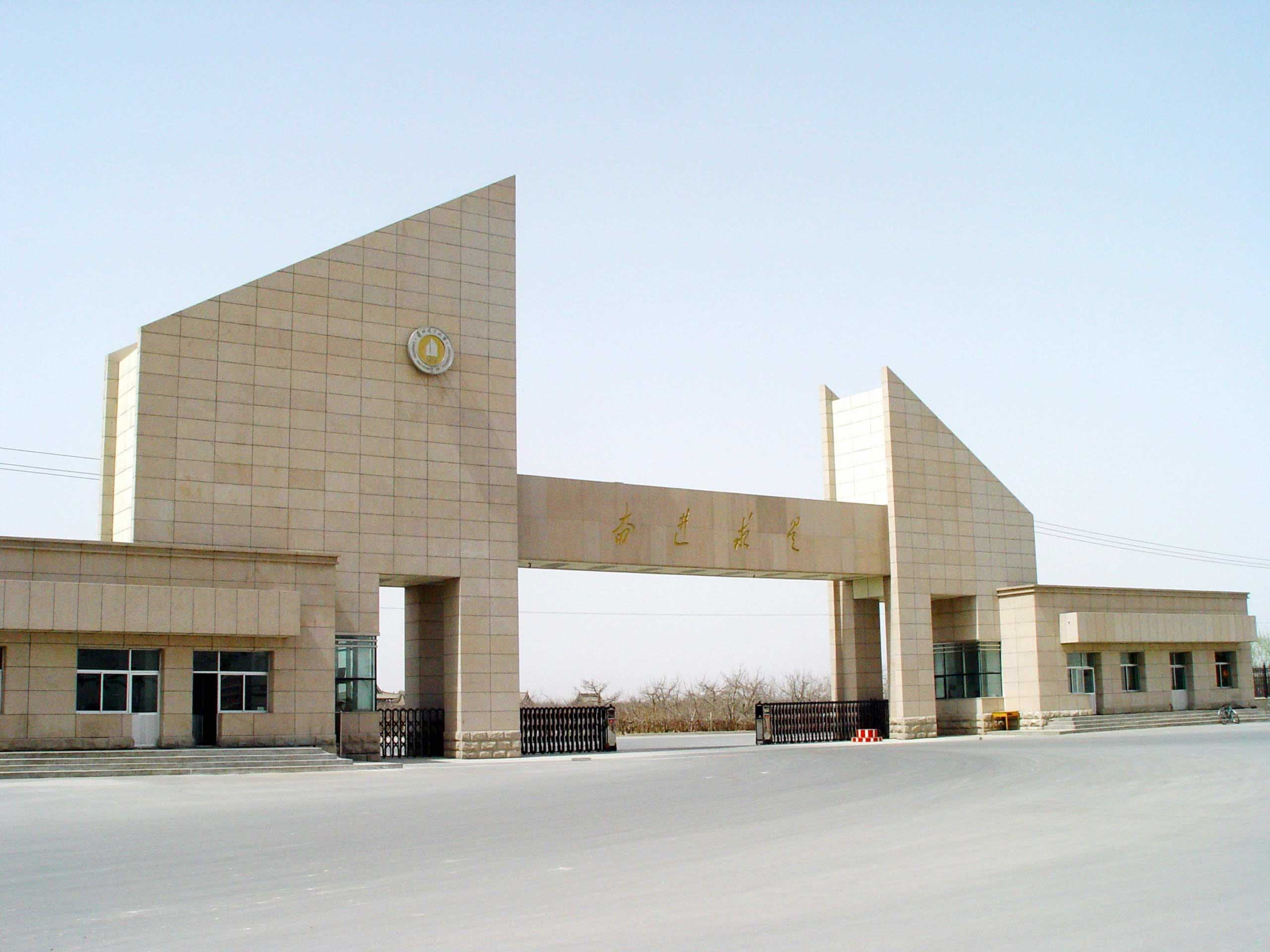 兰州理工大学，甘肃兰州，中国